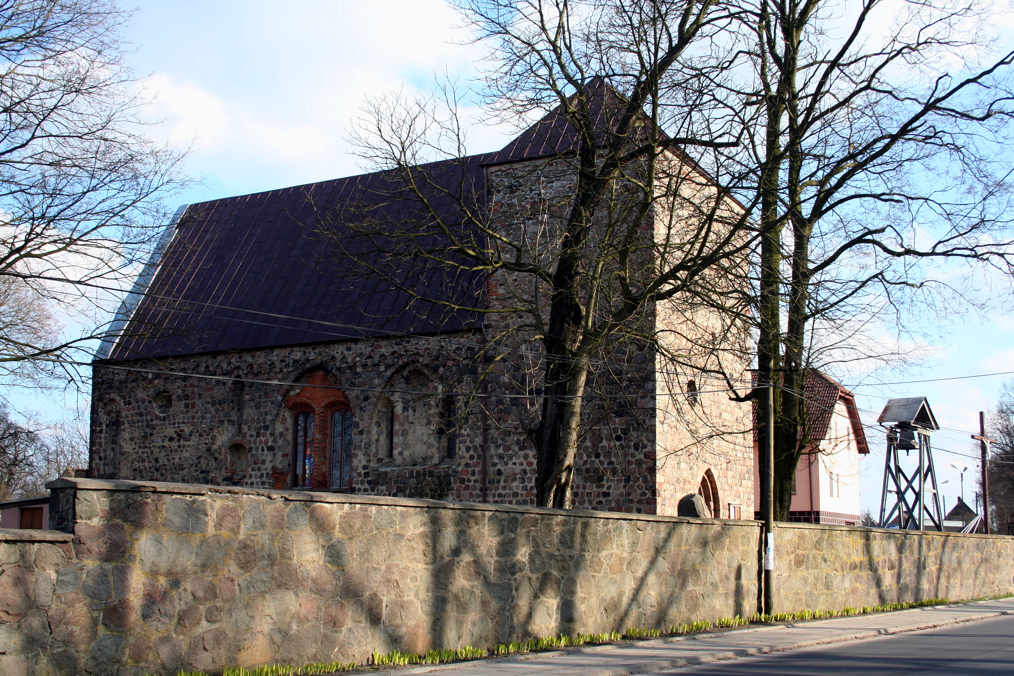 Kościół w Smolnicy (województwo zachodniopomorskie)